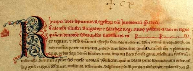 Факсимиле от преписка между папа Инокентий ІІІ и българския цар Калоян. Детайлът съдържа формулата: "Калоян, цар на българи и власи". Оригиналът се съхранява в Секретния архив на Ватикана.